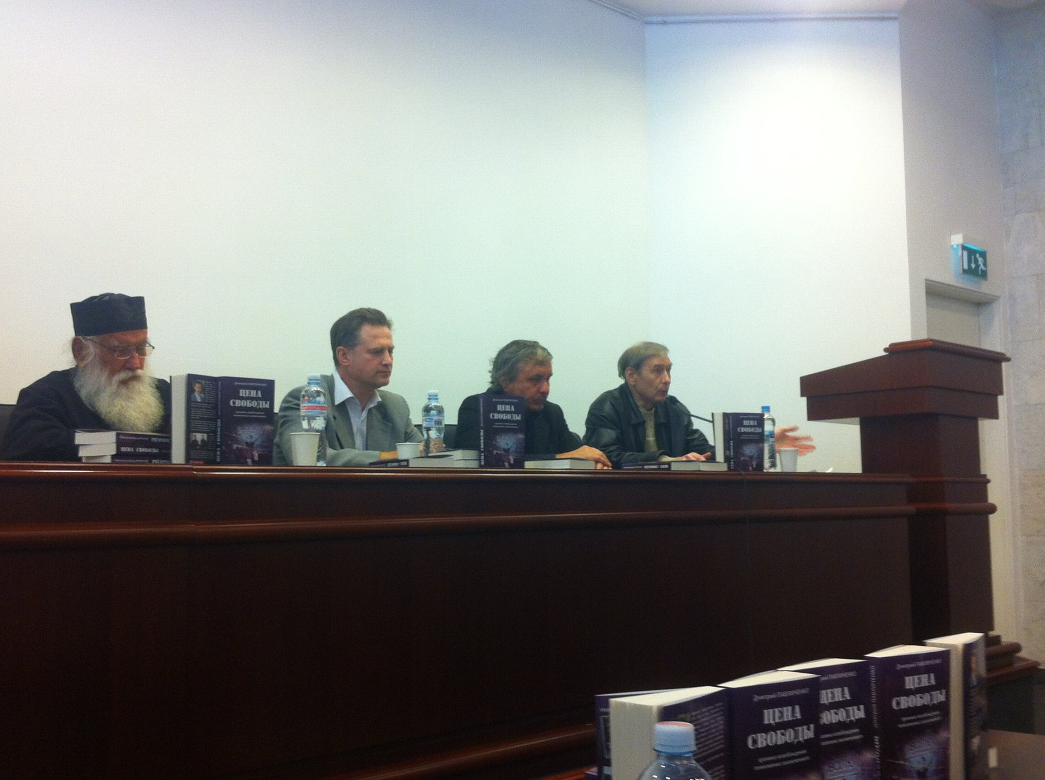 Презентация книги Дмитрия Павличенко "Цена свободы - хроника освобождения пожизненно заключенного"